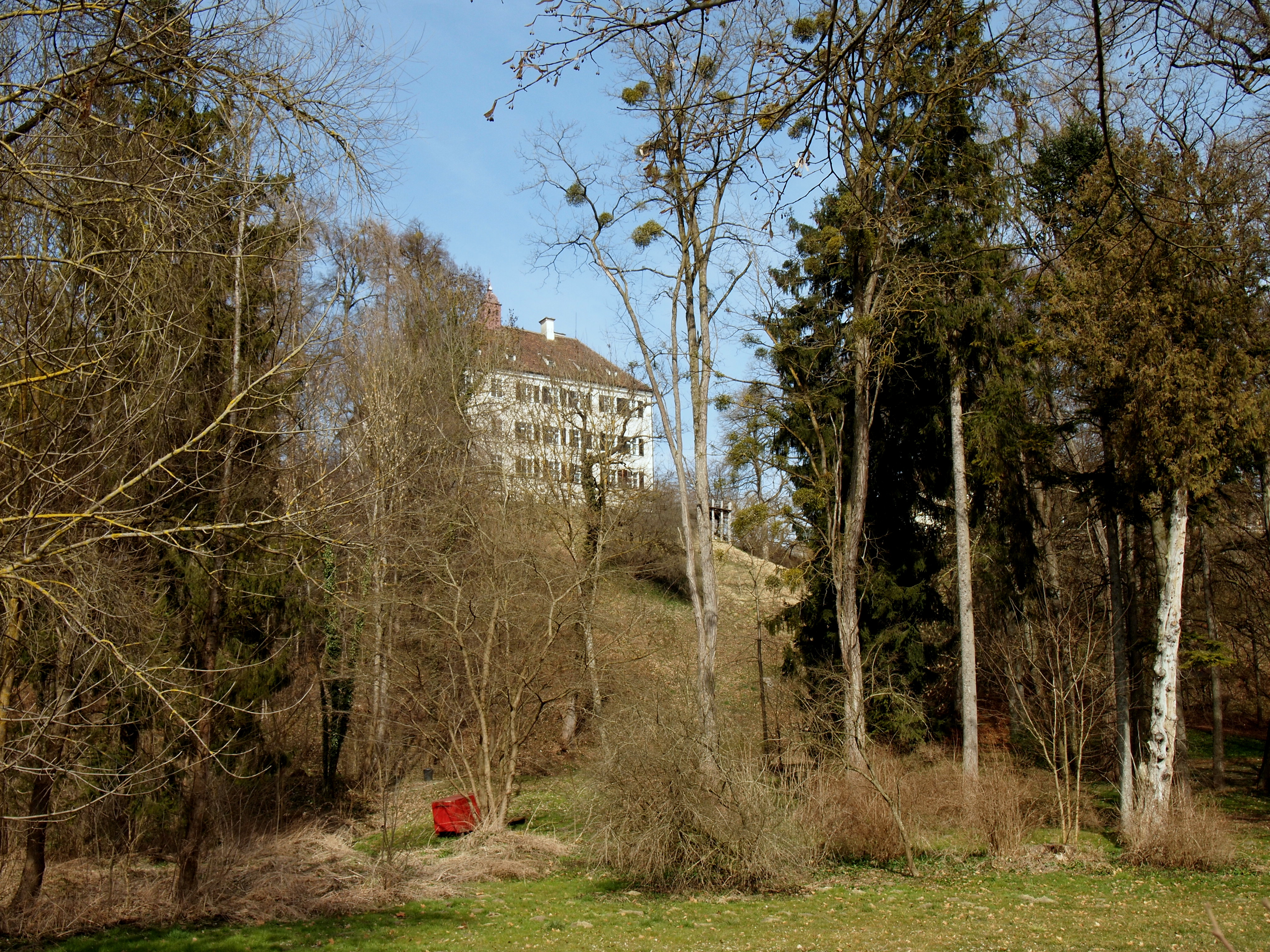 Schloss Greifenberg